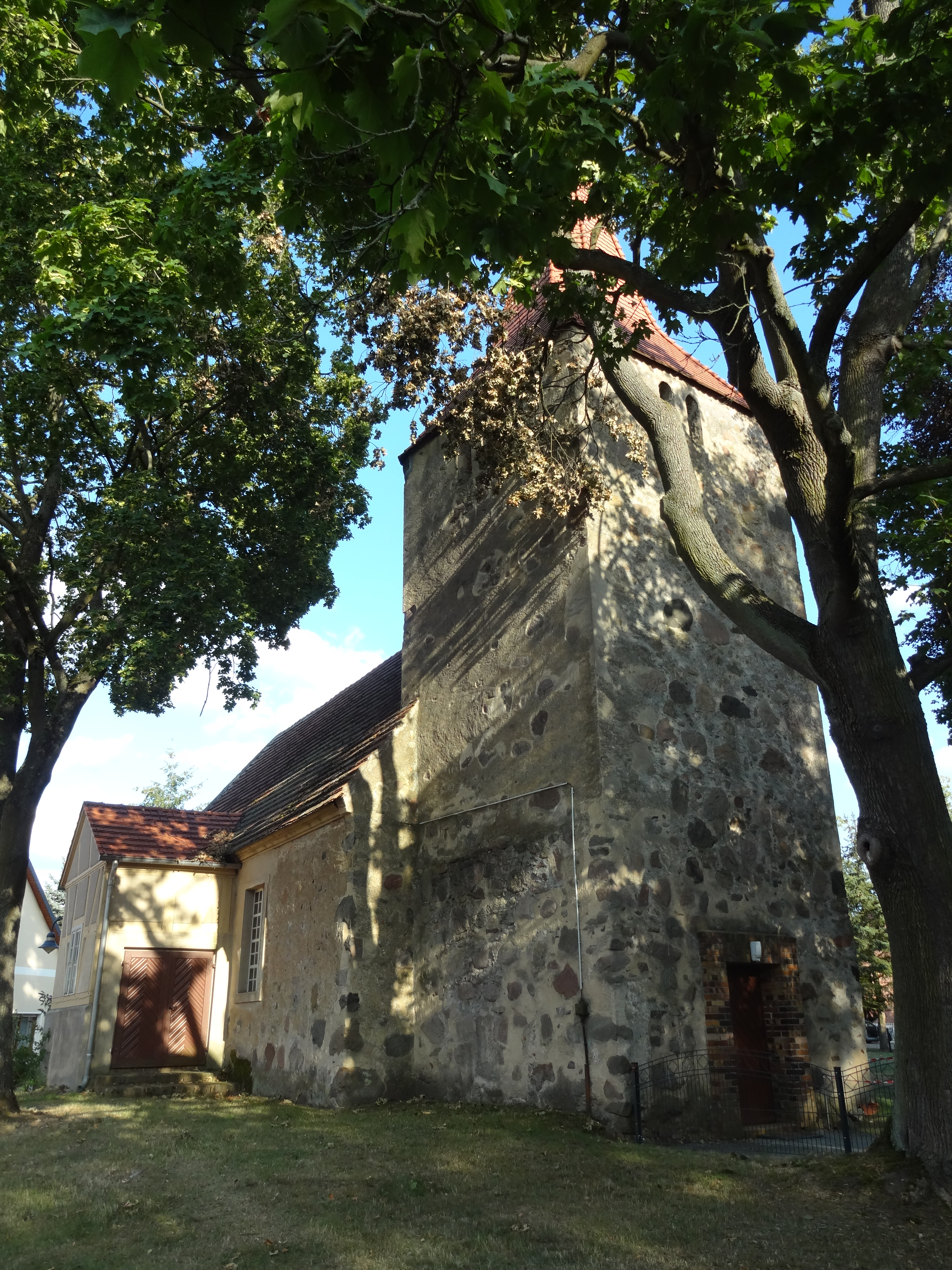 Dorfkirche Zagelsdorf